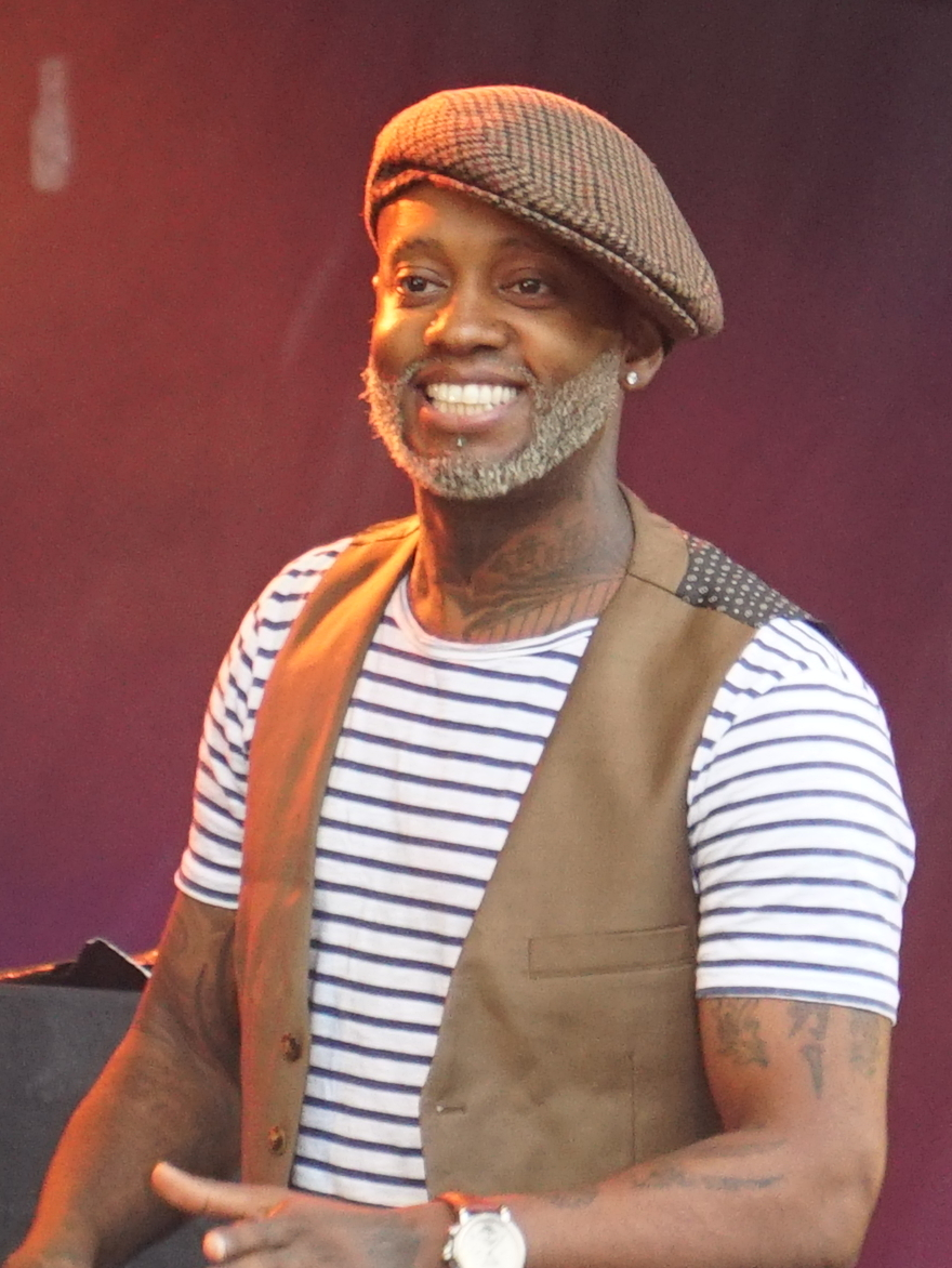 POur la soirée du 14 juillet à Reims.